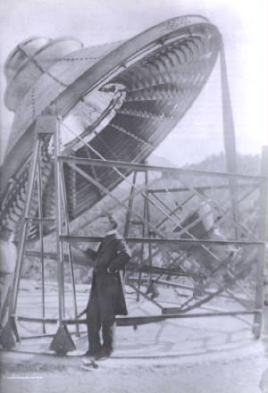 padre himalya